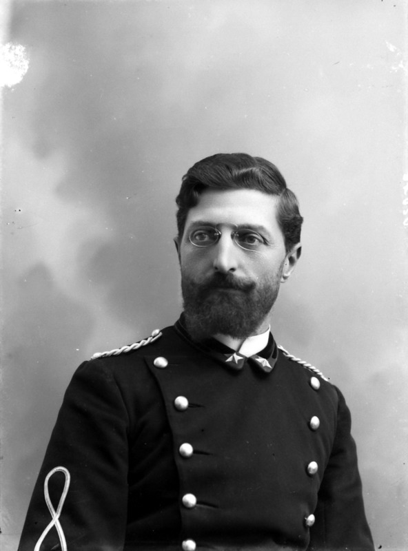 Arturo Olivieri Sangiacomo fotografato da Mario Nunes Vais